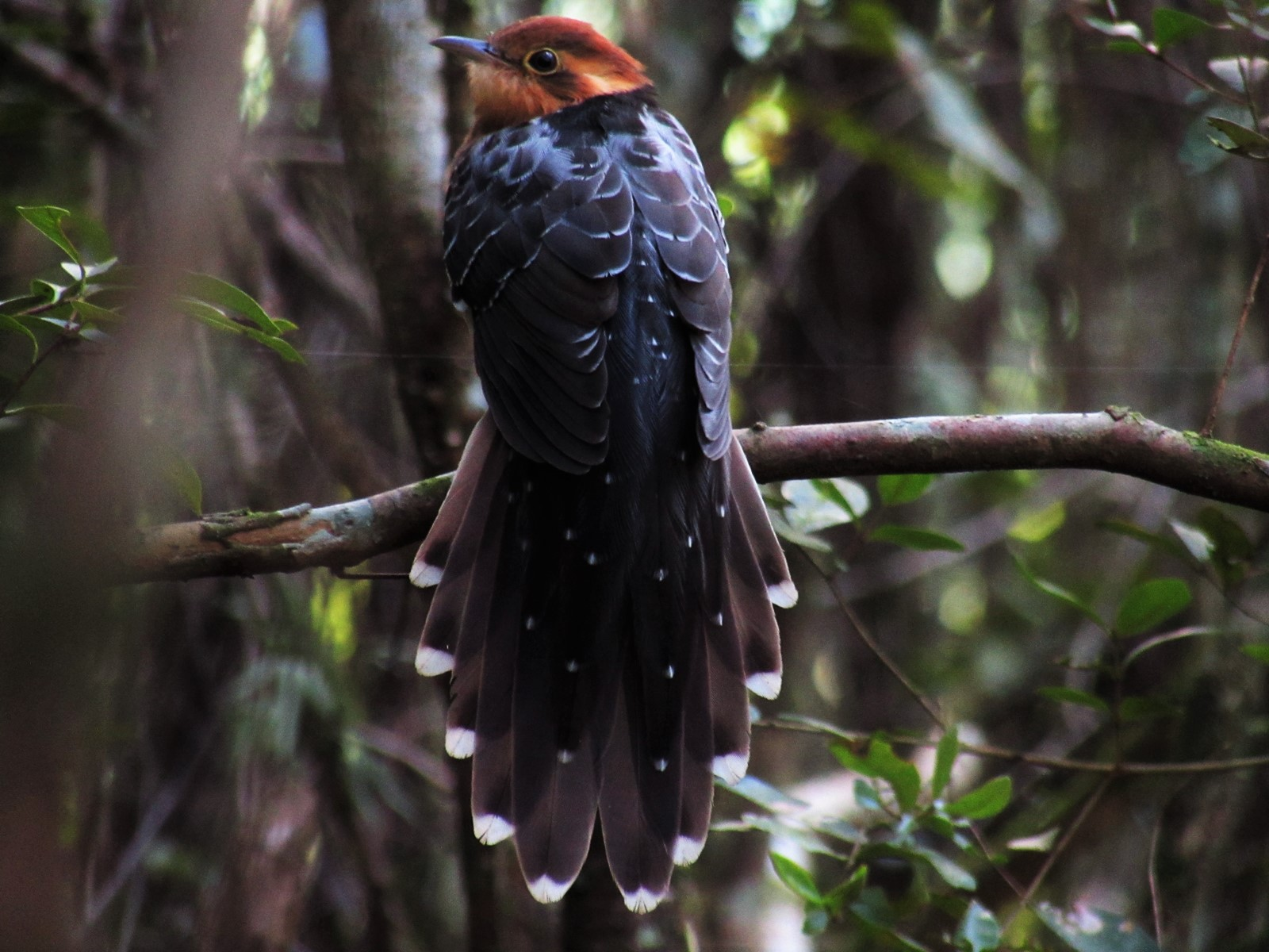 Peixe-frito-pavonino, ave de pouca ocorrência no meu estado e muito ouvida mas raramente vista. Pouco se sabe sobre esta magnífica espécie.